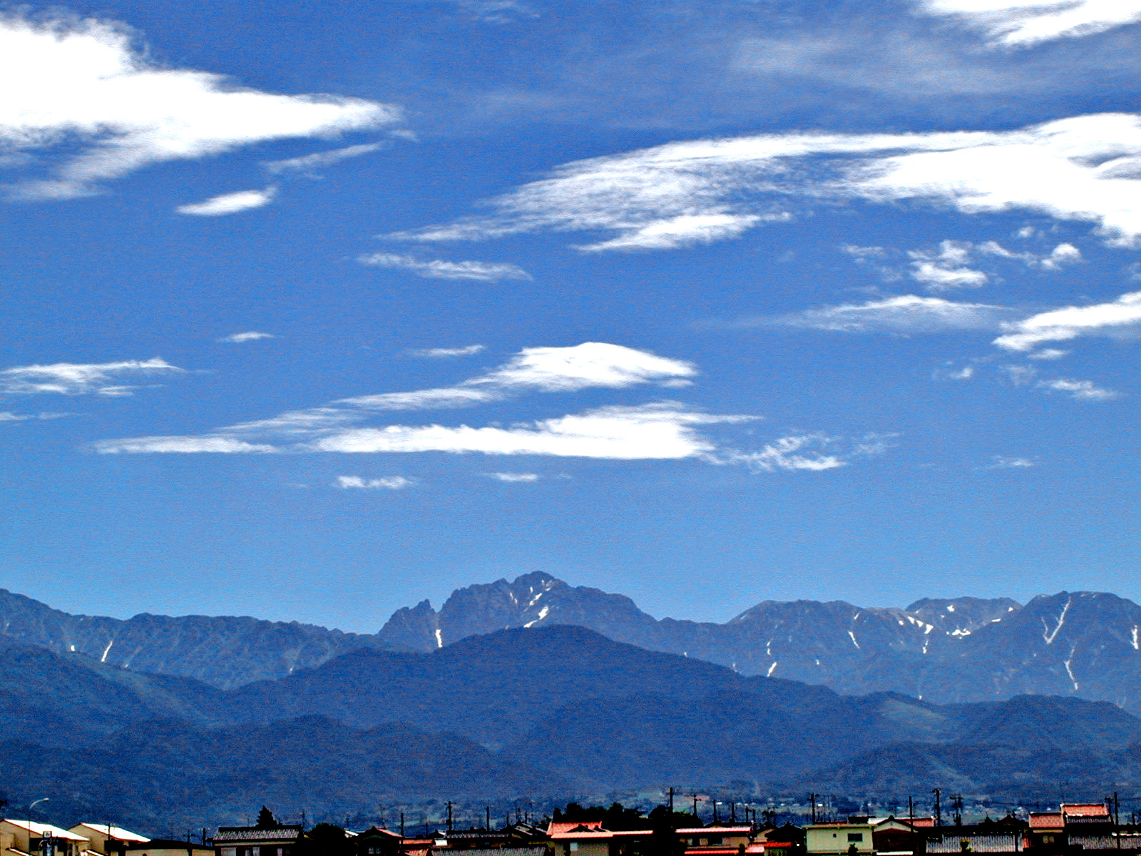 剣岳、立山三山 Turugi＆Tateyama ３mauntains